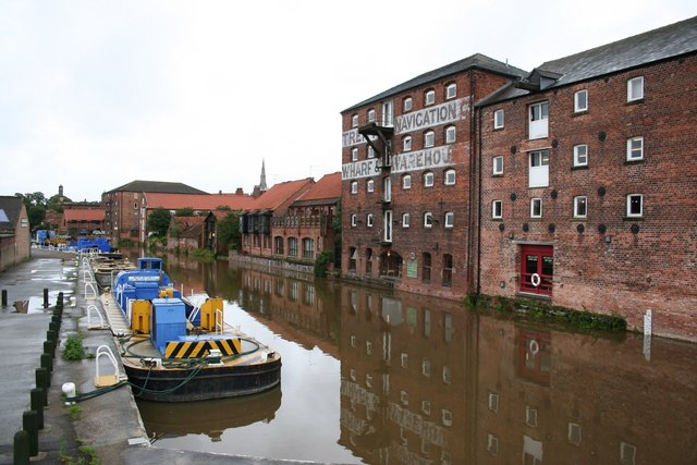 River Trent